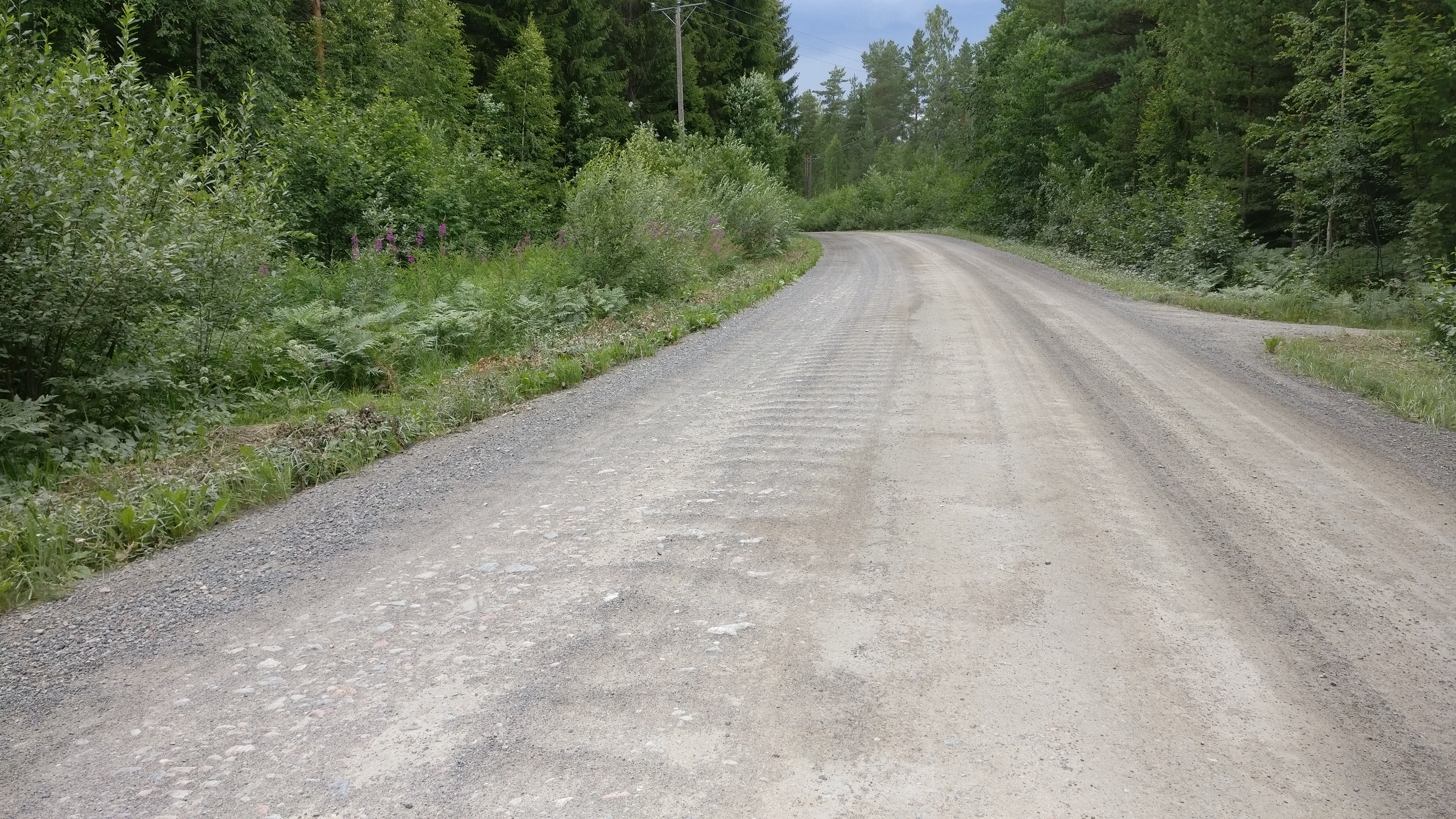 Nimismiehen kiharoita soratiellä.